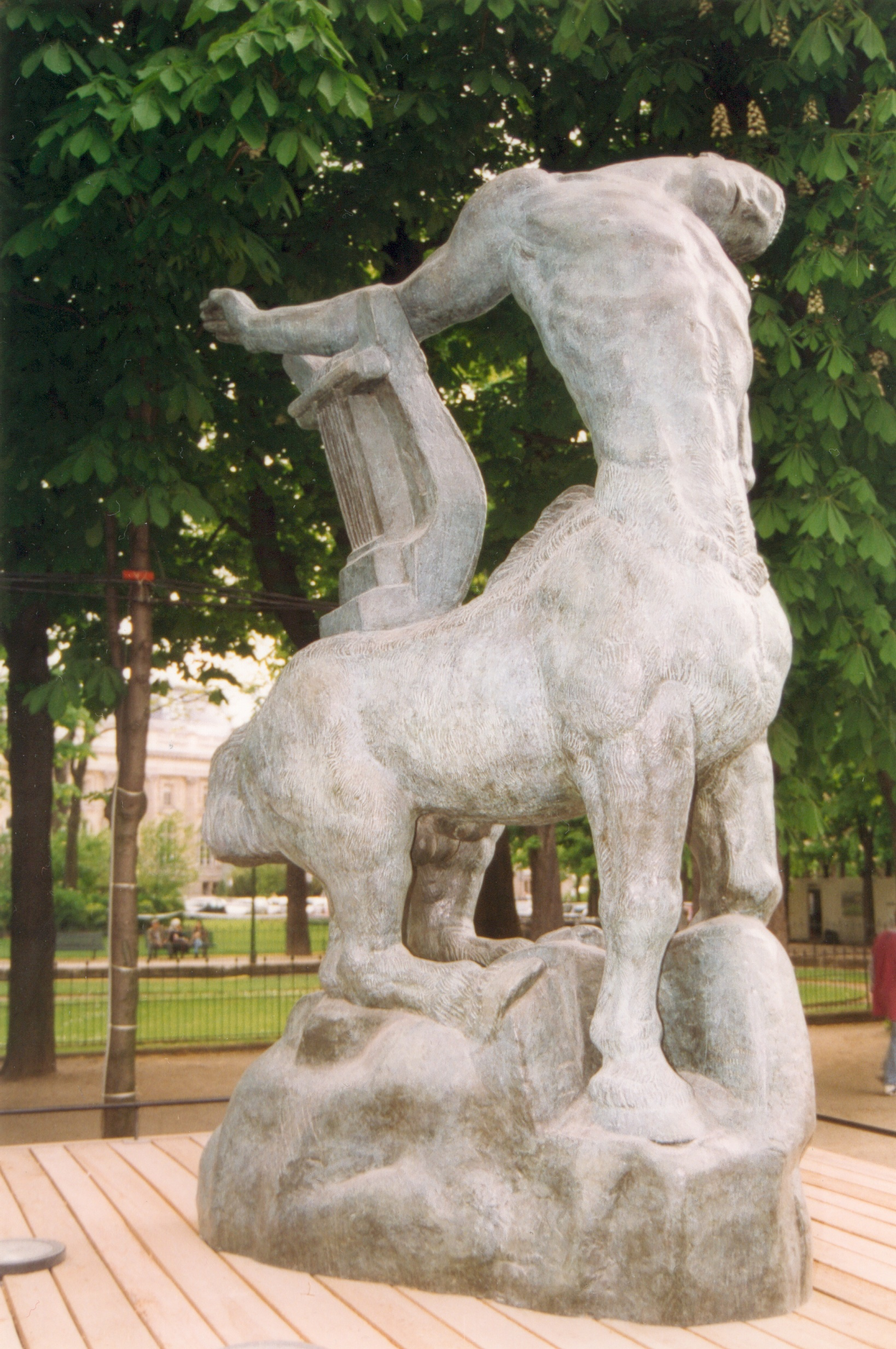 France Paris Le Centaure Mourant, bronze, sculpure d'Antoine Bourdelle (1914) Photographie prise par GIRAUD Patrick